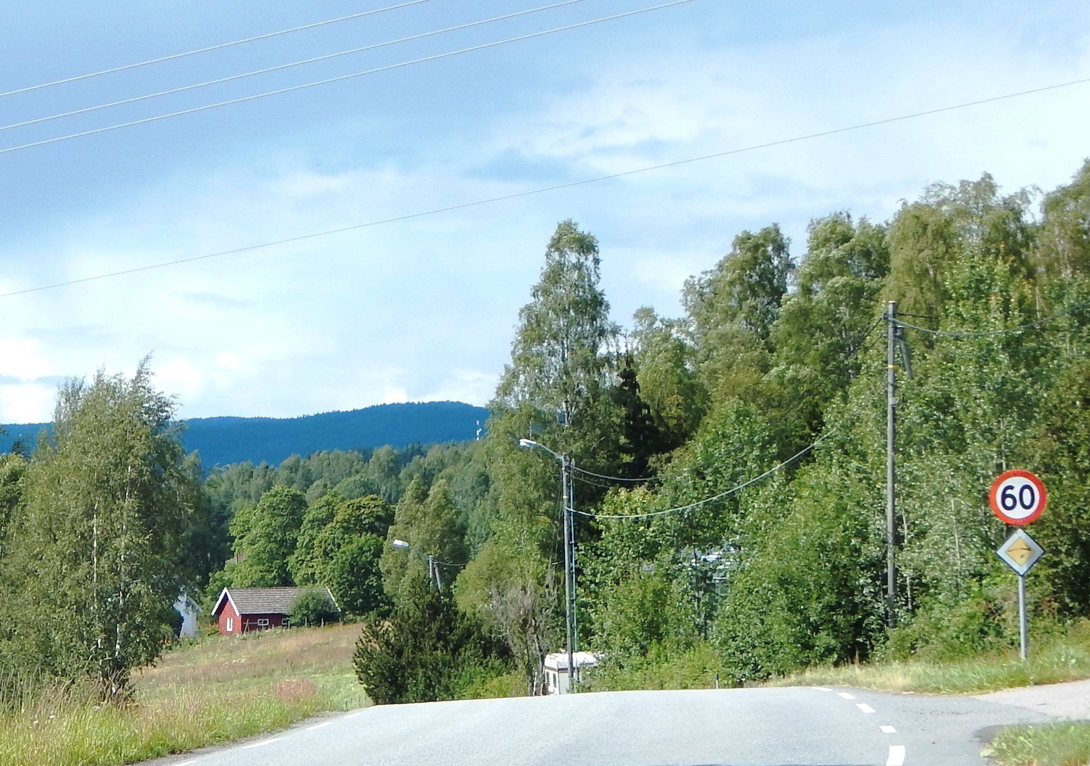 Gamlevegen i Hakadal